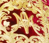 Escudo que aparece en el bacalao de la Hermandad